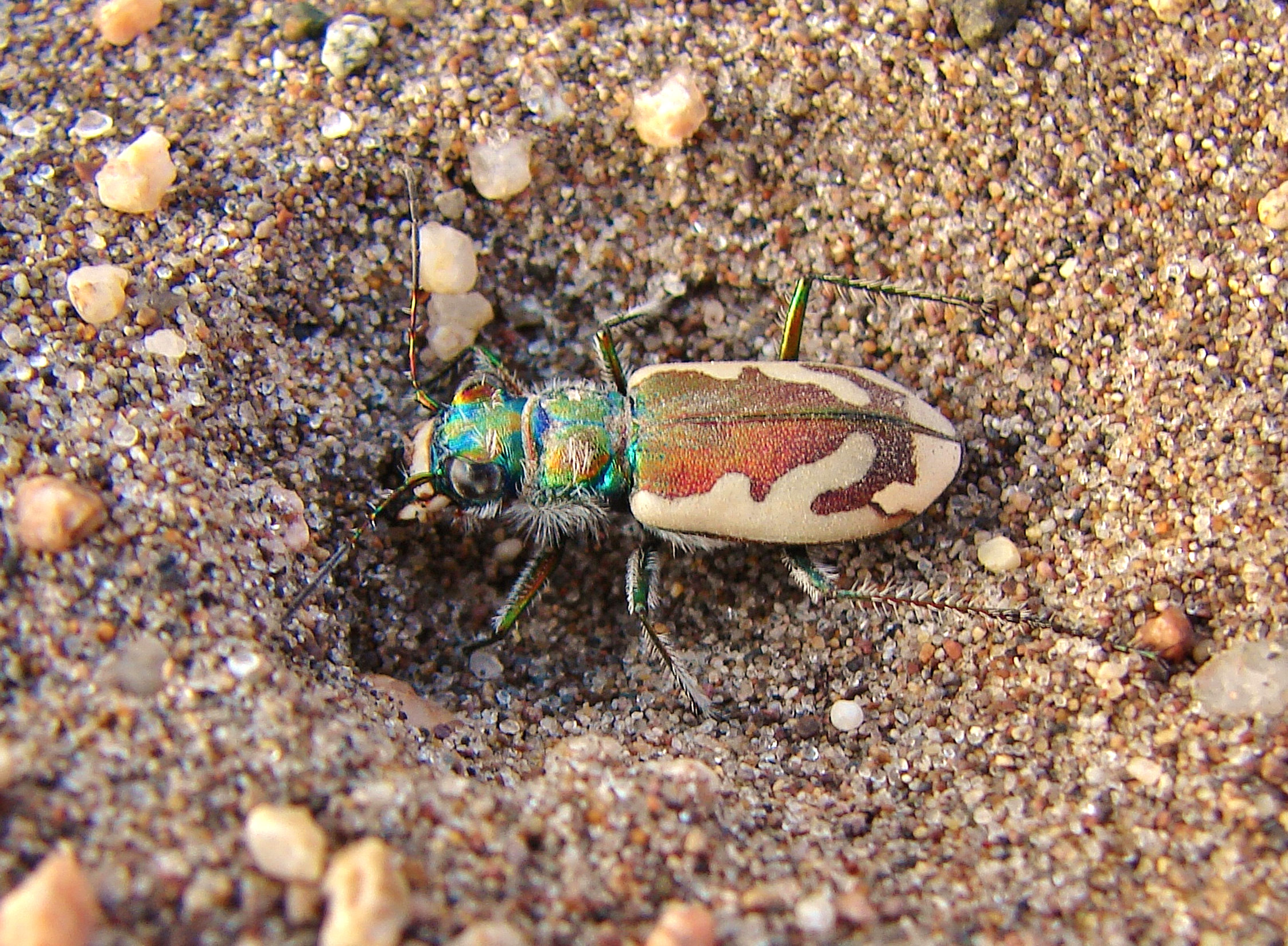 NPS/Greg Jacobs